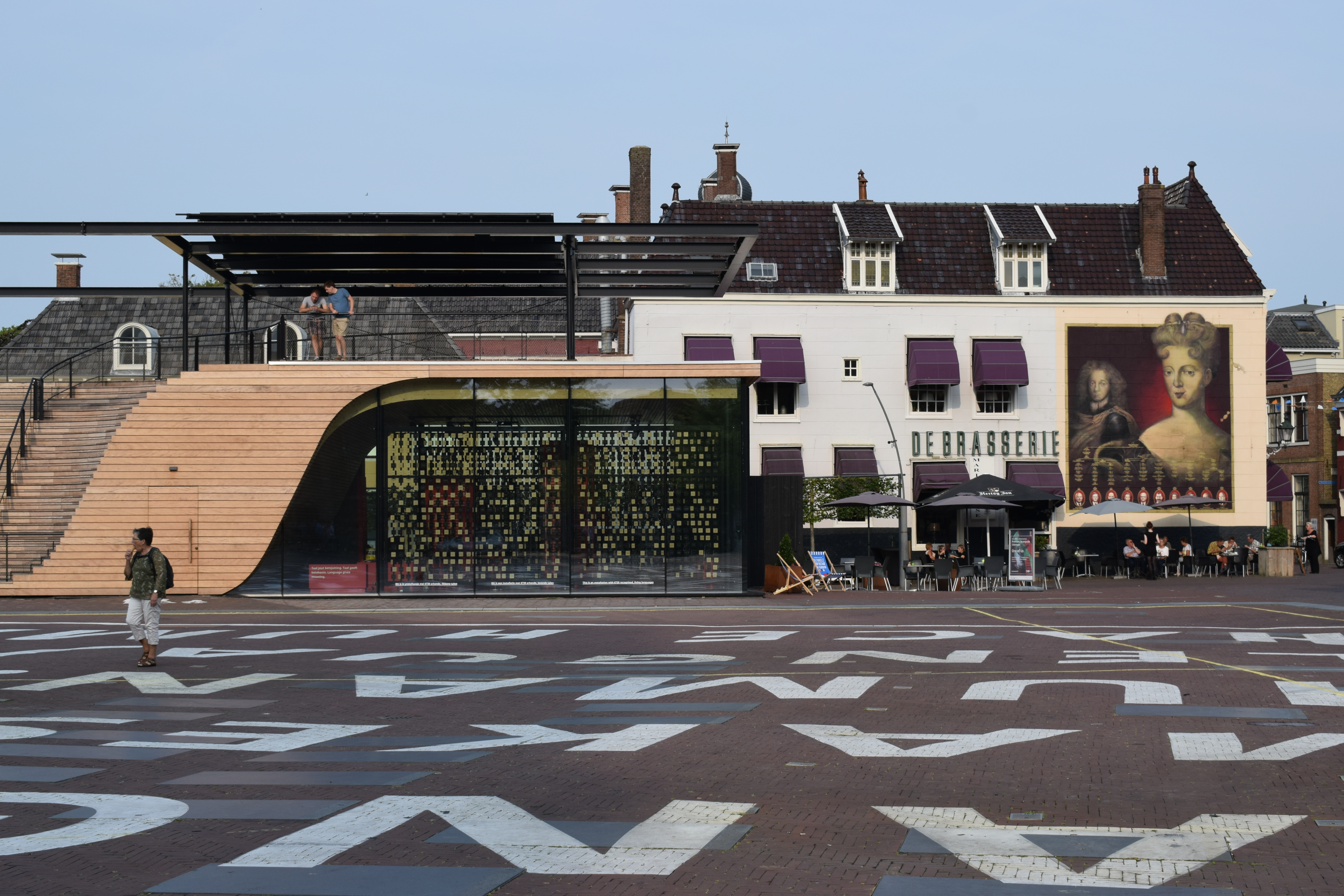 Vue de Leeuwarden en Frise (Pays-Bas).